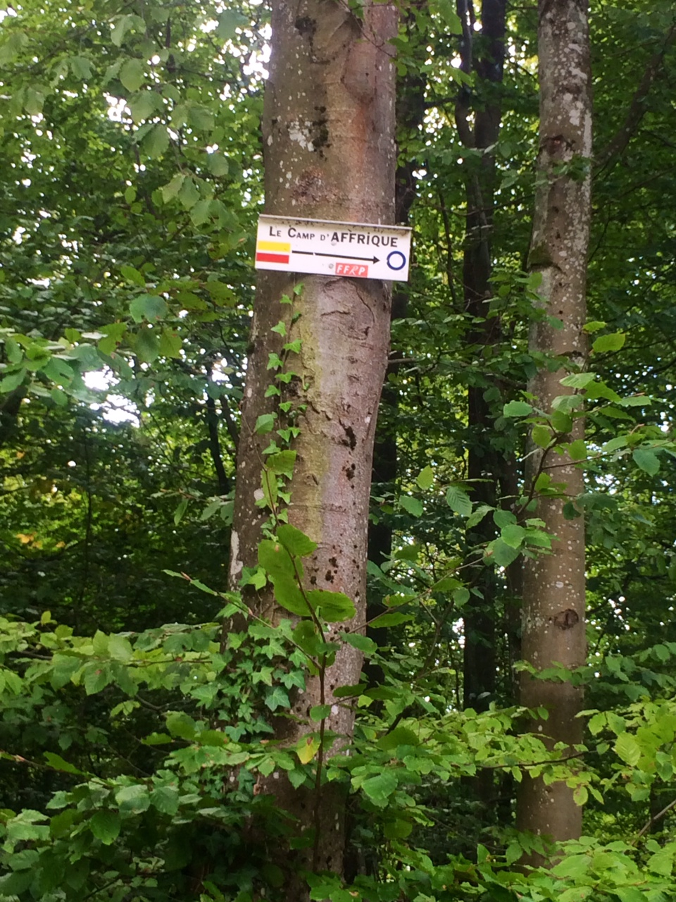 vestiges leuques